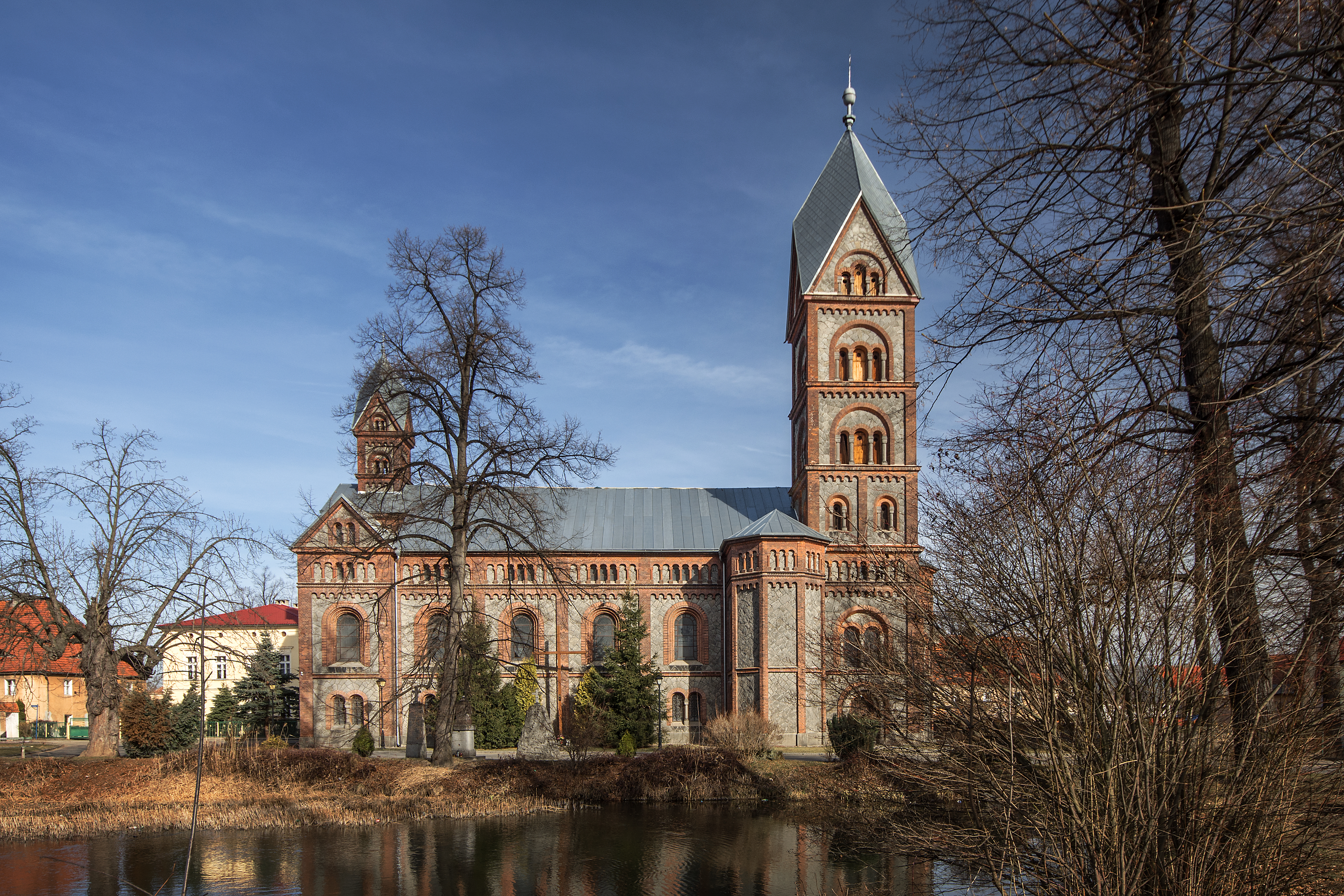 Roztoka, kościół par. p.w. św. Stanisława, XV, XVII (brak w wykazie WUOZ)